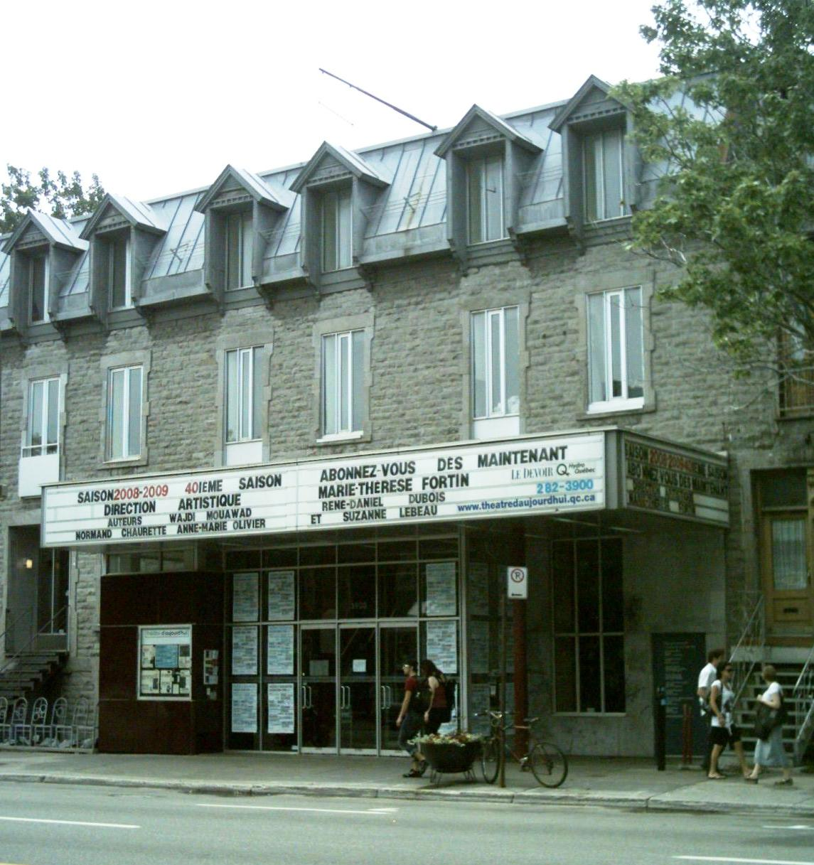 Le Théâtre d'Aujourd'hui est situé au 3900 rue Saint_Denis à Montréal.